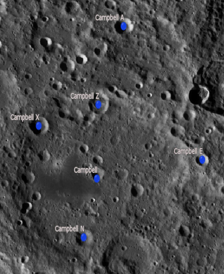 Cráter lunar Campbell. Cráteres satélite. (Imagen LRO)